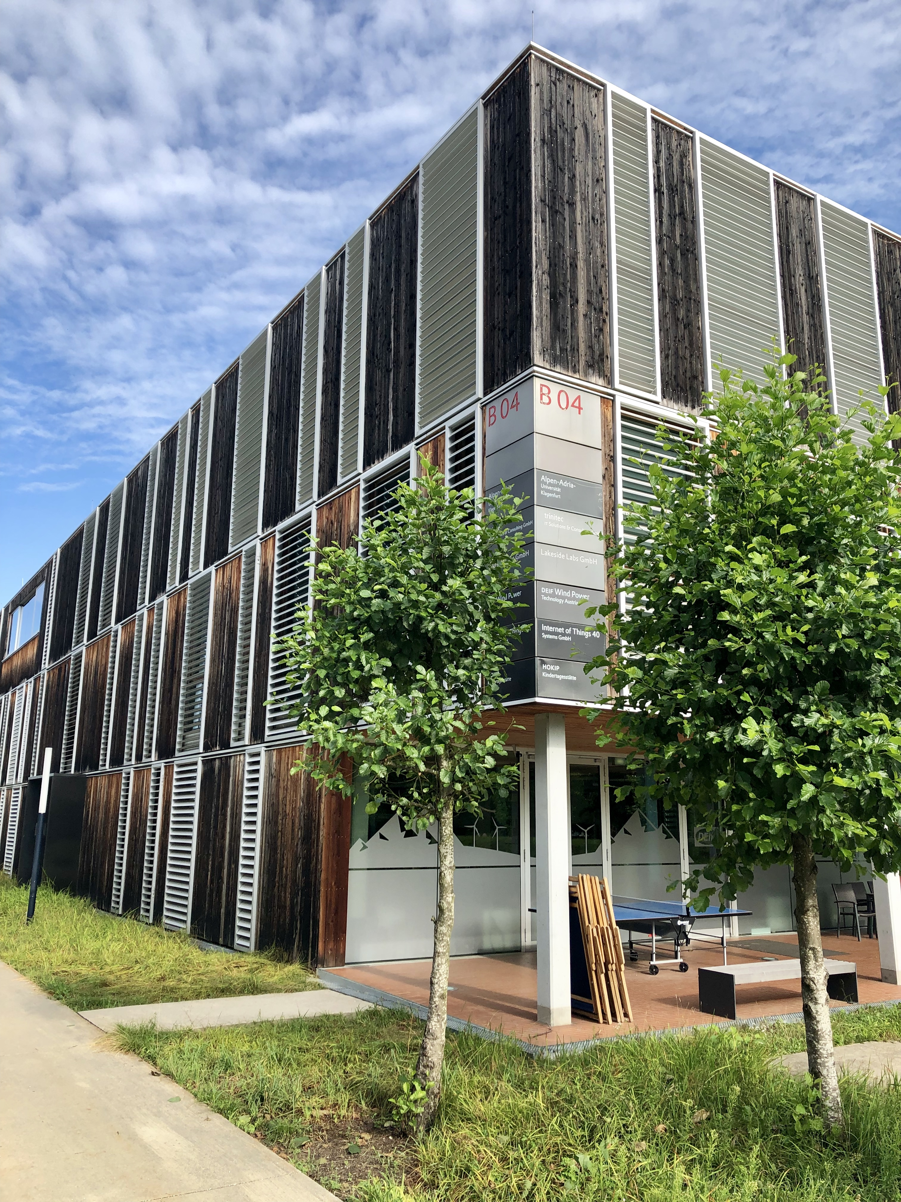 Gebäude B04 im Klagenfurter Lakeside & Technology Park